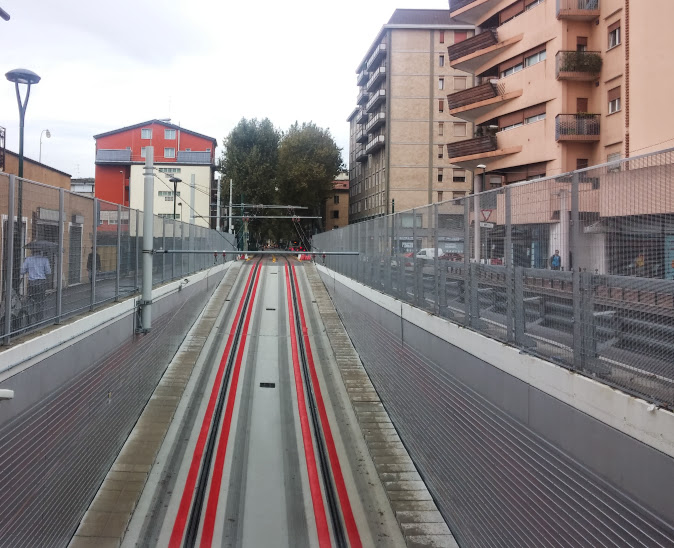 Rampa sottopasso Translohr Mestre